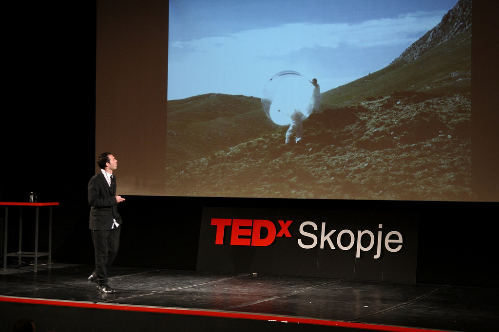 foto